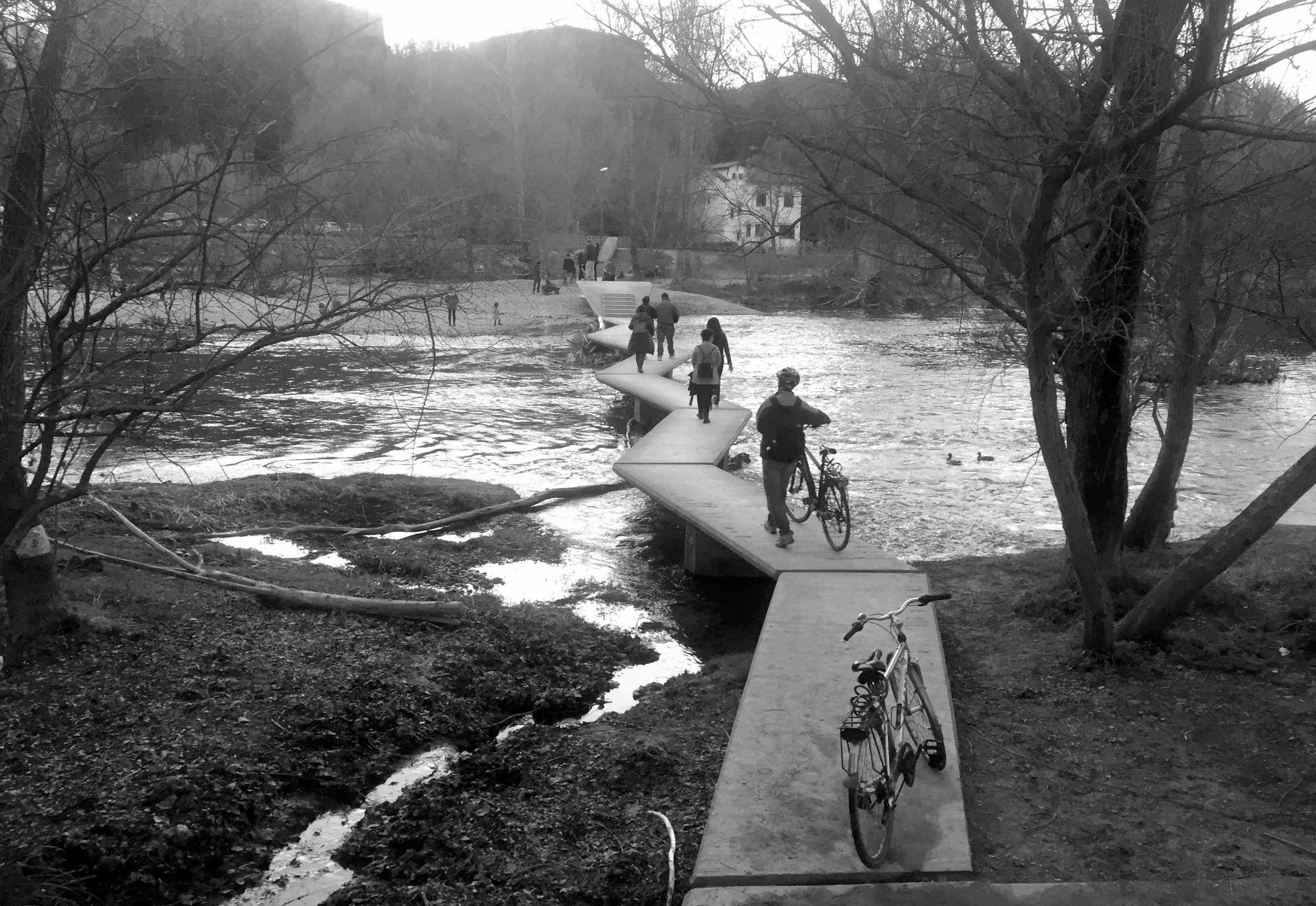 Txirringak Arga ibaiaren parkean Iruñeko pasarelak pasatzen.